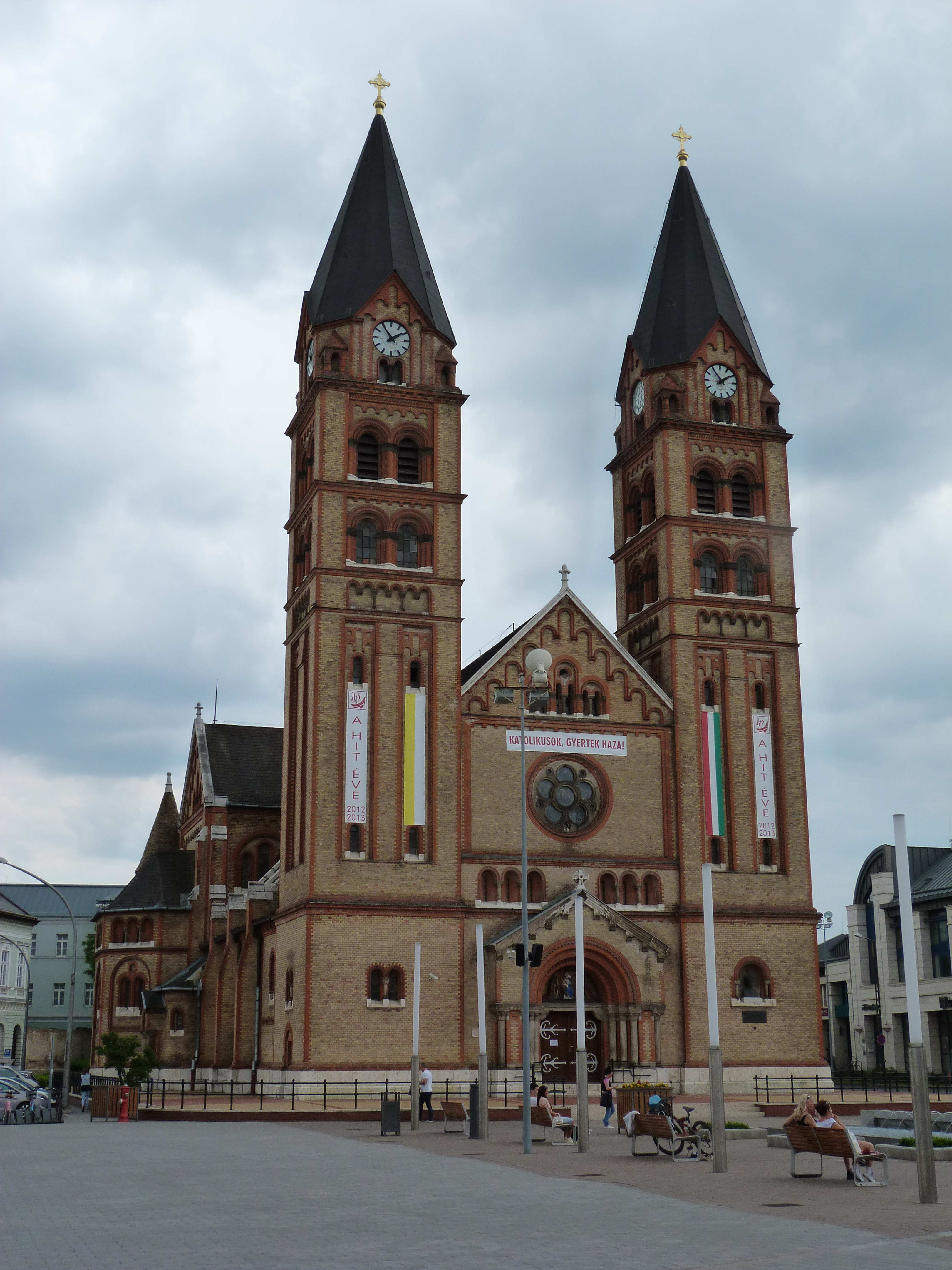 A felvétel 2013. Május 17 –én pénteken készült Nyíregyházán. ©© Derzsi Elekes Andor, Budapest, 2013, A kép és filmfelvételek egészben, vagy részletekben másolását, bármilyen úton történő sokszorosítását és felhasználását a szerző ellenérték nélkül, jogutódjaira is kihatóan megengedi. Az engedély kiterjed a kereskedelmi célú hasznosításra is. Kéri azonban nevének feltüntetését a felhasználás során. A Metapolisz sorozat valamennyi képe és filmje Creative Commons alatti valamint kereskedelmi - for profit - célra is felhasználható. Ajánlott hivatkozás: Derzsi Elekes Andor: Metapolisz DVD line